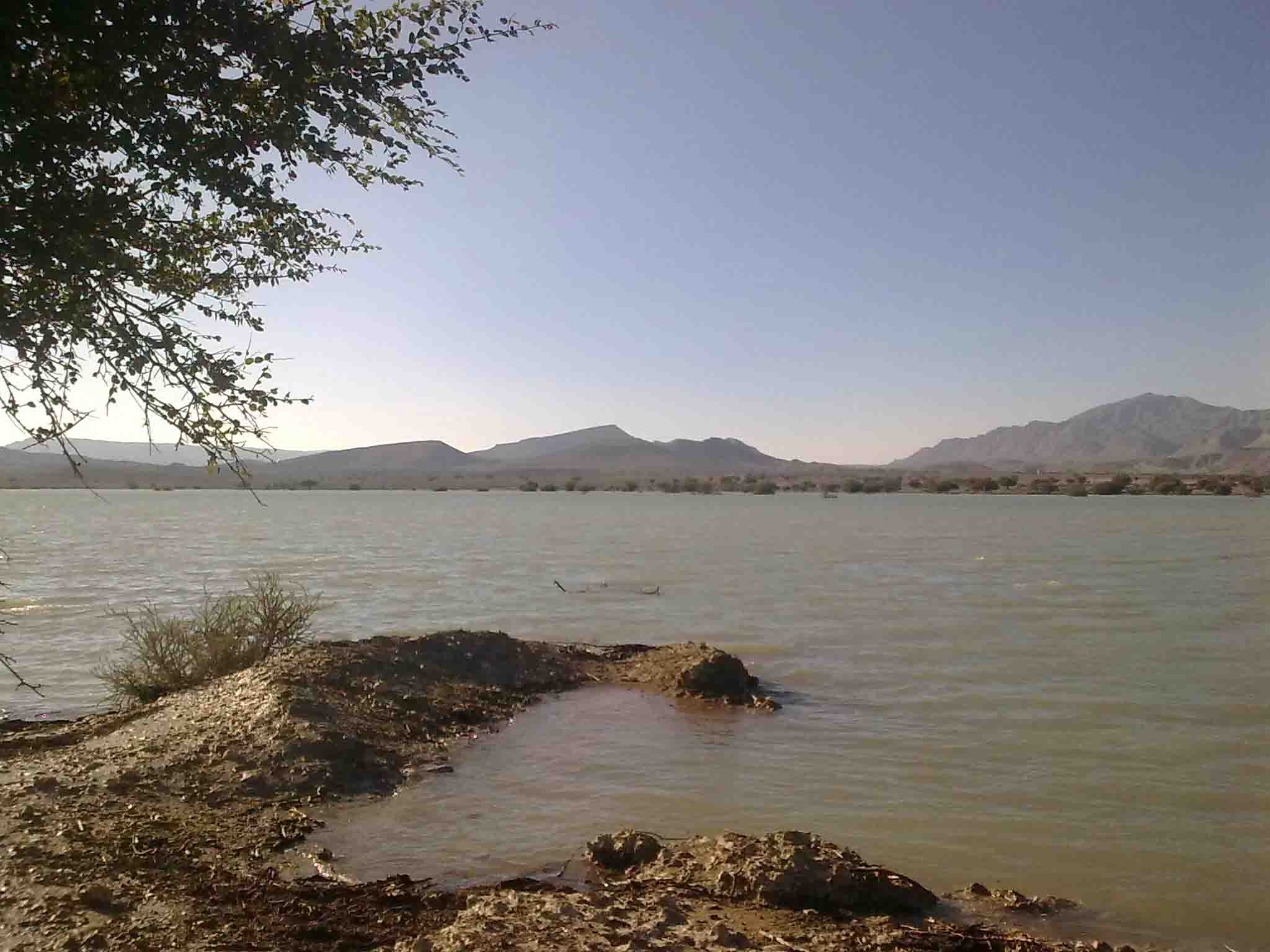 سد فرشته جان جویم